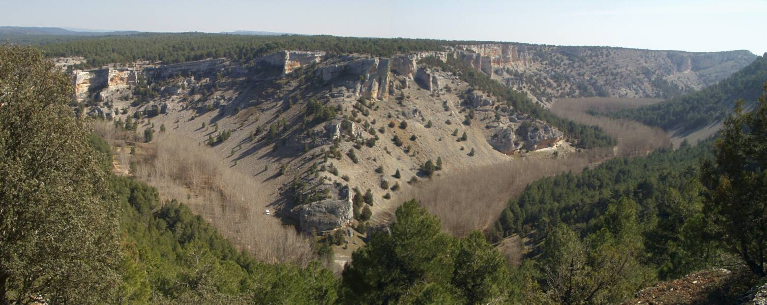 "El Mirador de las Gullurias (Rio Lobos) Ucero, Soria"